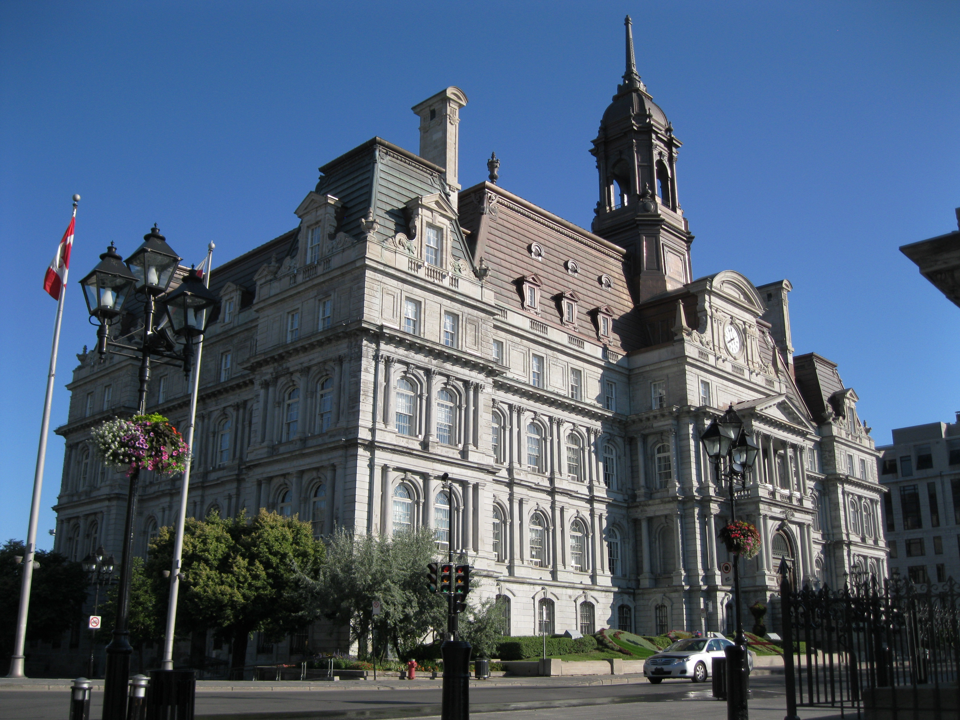 Hôtel de ville de Montréal vu de la place Jacques-Cartier